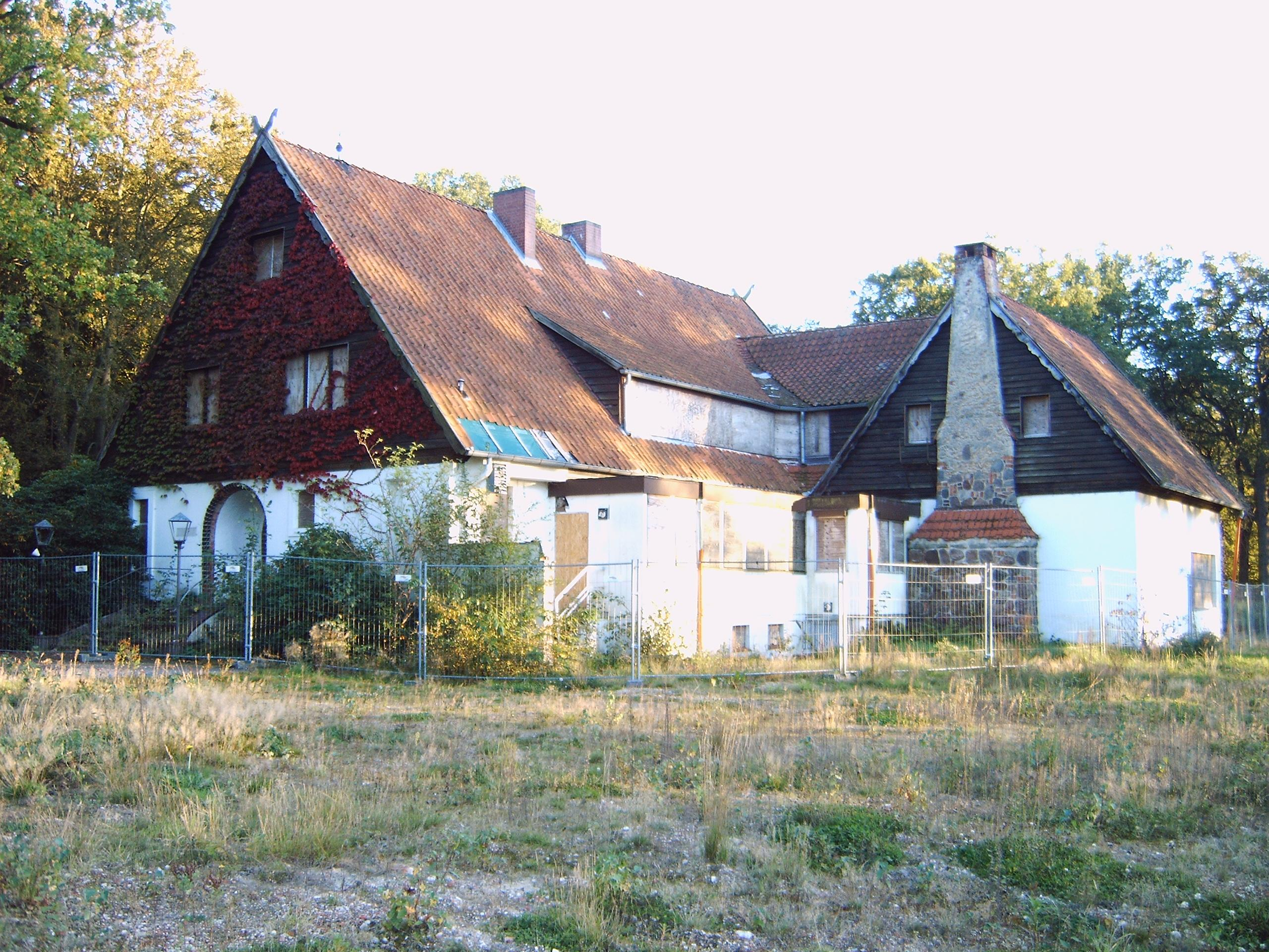 Kulturdenkmal Möllering-Villa am Wischfeld in Lüneburg-Häcklingen. Ehemaliges Hauptquartier der britischen Streitkräfte unter General Dempsey und Verhandlungsort der Kapitulation deutscher Truppen Nordwestdeutschlands, Hollands und Dänemarks Anfang Mai 1945 zwischen Feldmarschall Montgomery und deutschen Offizieren unter Generaladmiral von Friedeburg. Zustand September 2011. Vom Eigentümer zur Abbruchreife vernachlässigt.